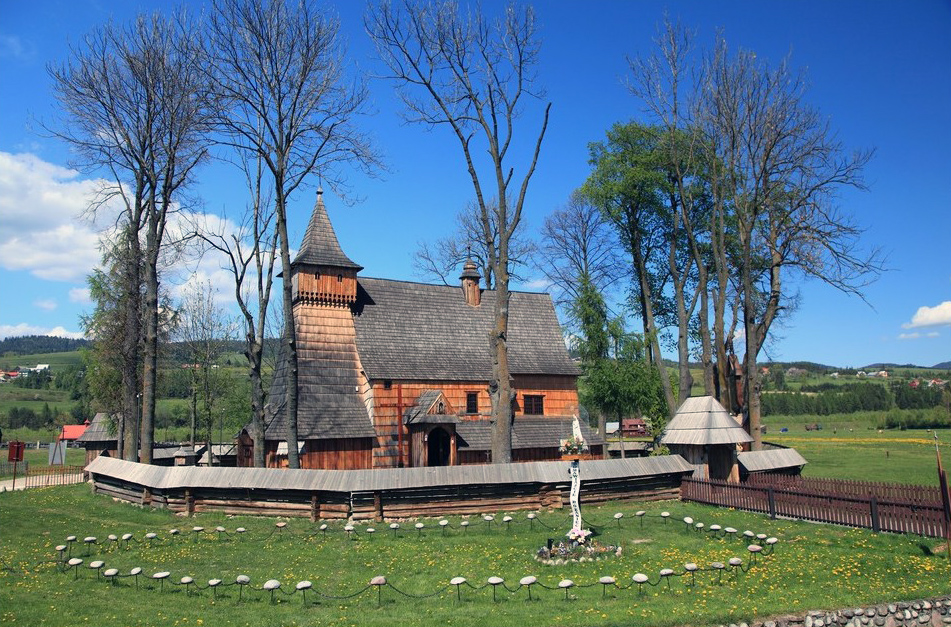 Dębno (powiat nowotarski). Drewniany kościół gotycki św. Michała Archanioła